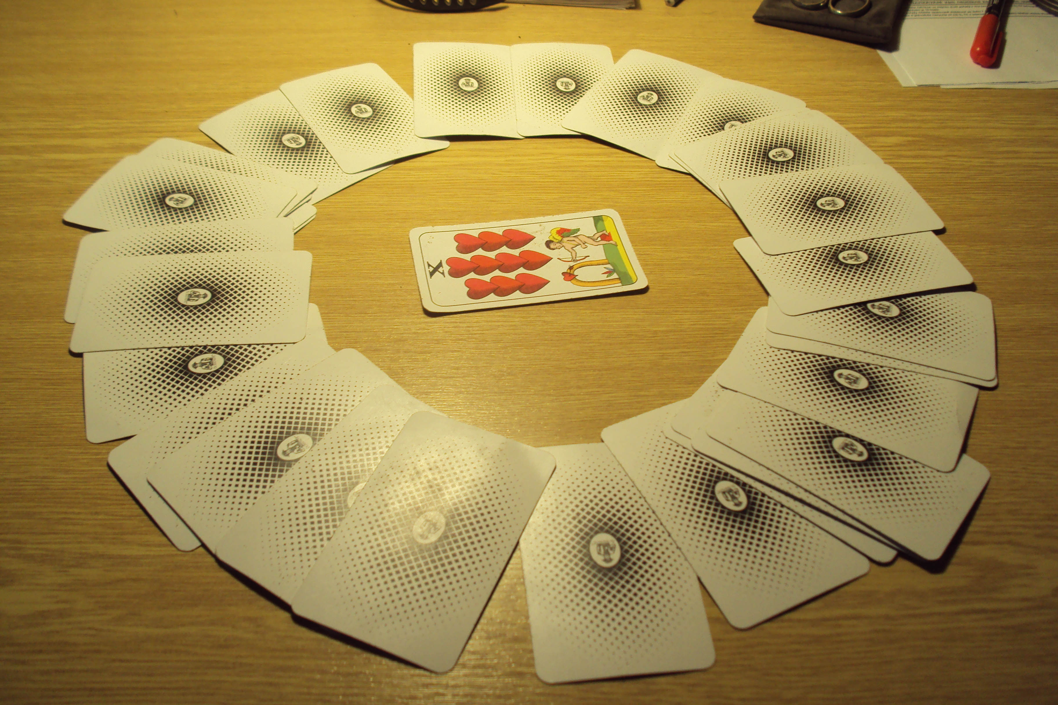 Karetní hra Zelená louka na začátku